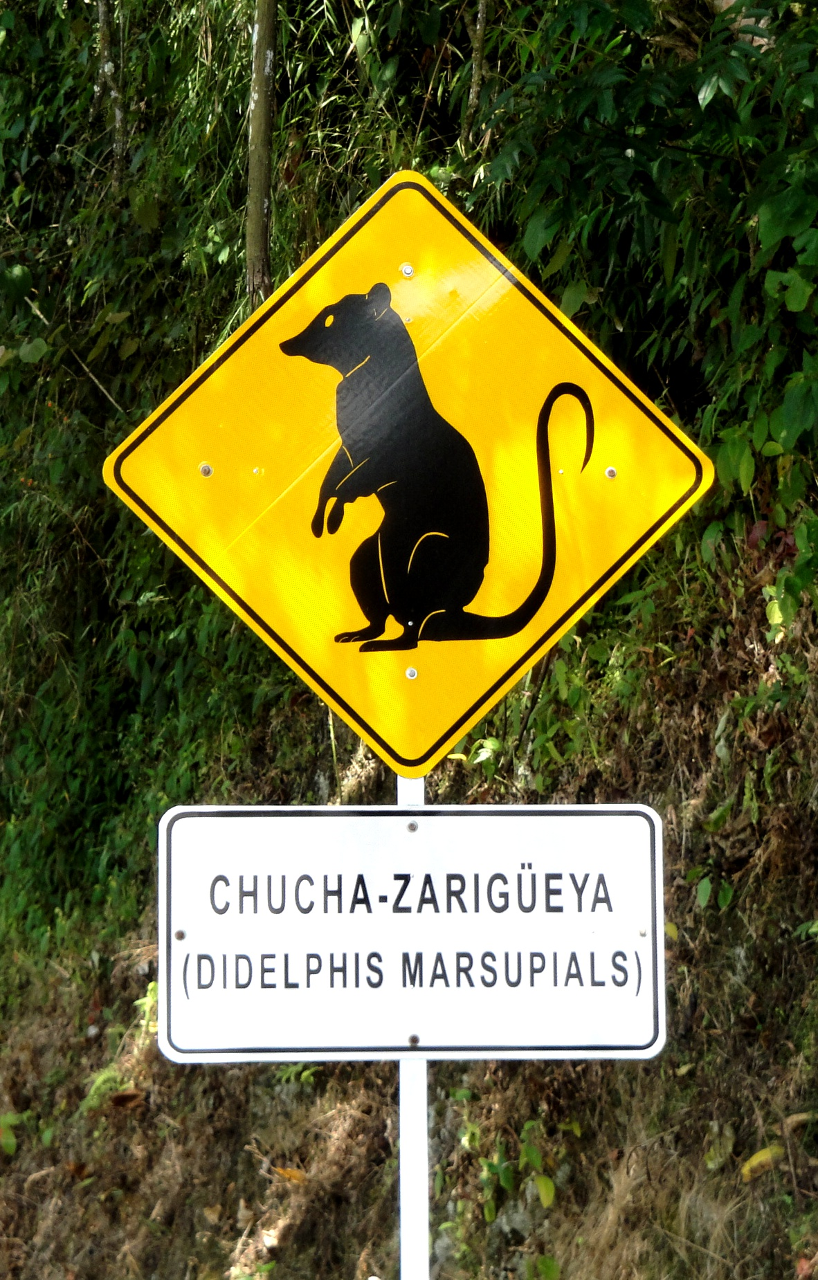 Señal preventiva de cruce de chuchas en una carretera colombiana